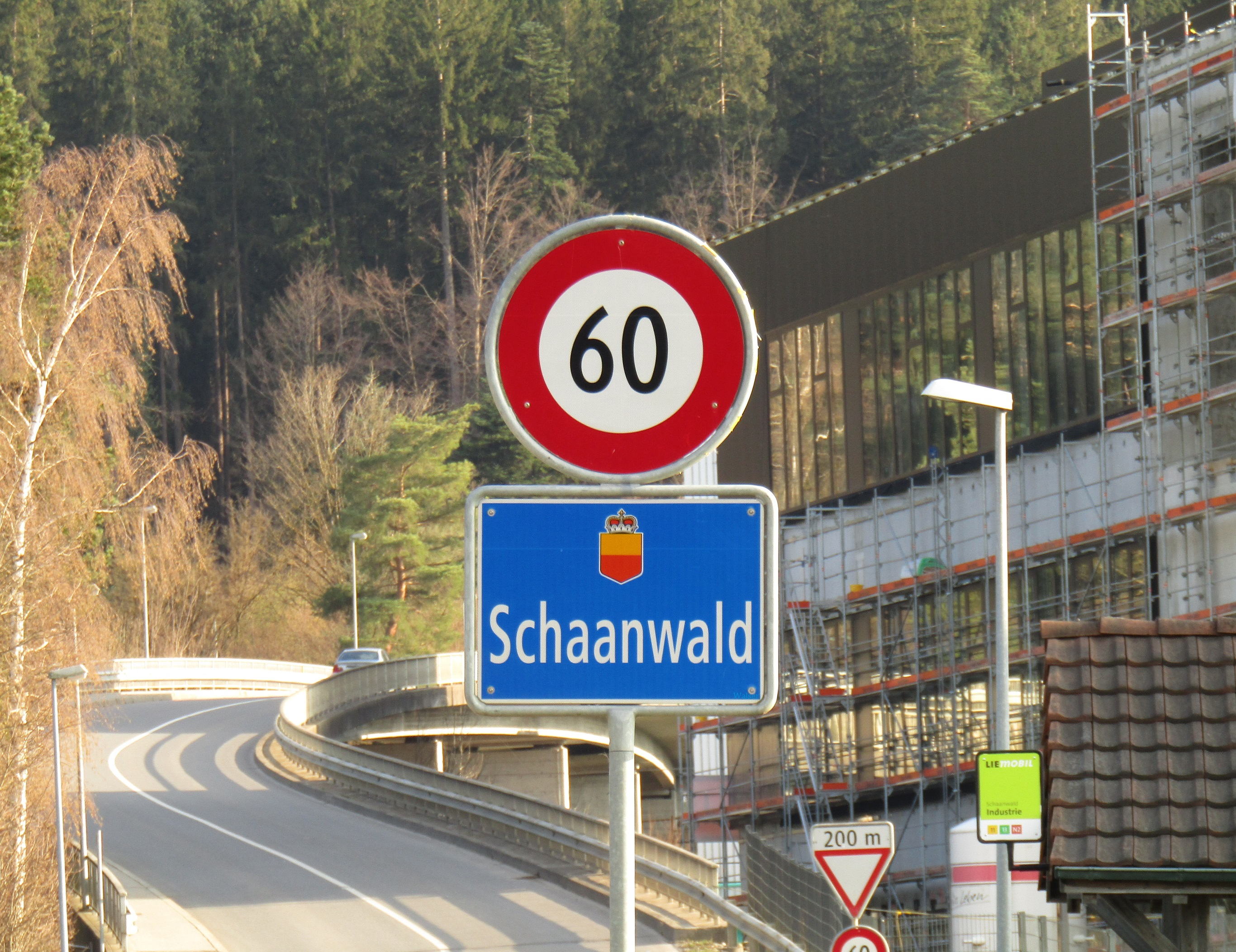 Schaanwald Liechtenstein Ortsbeginn auf Hauptstrasse (West)